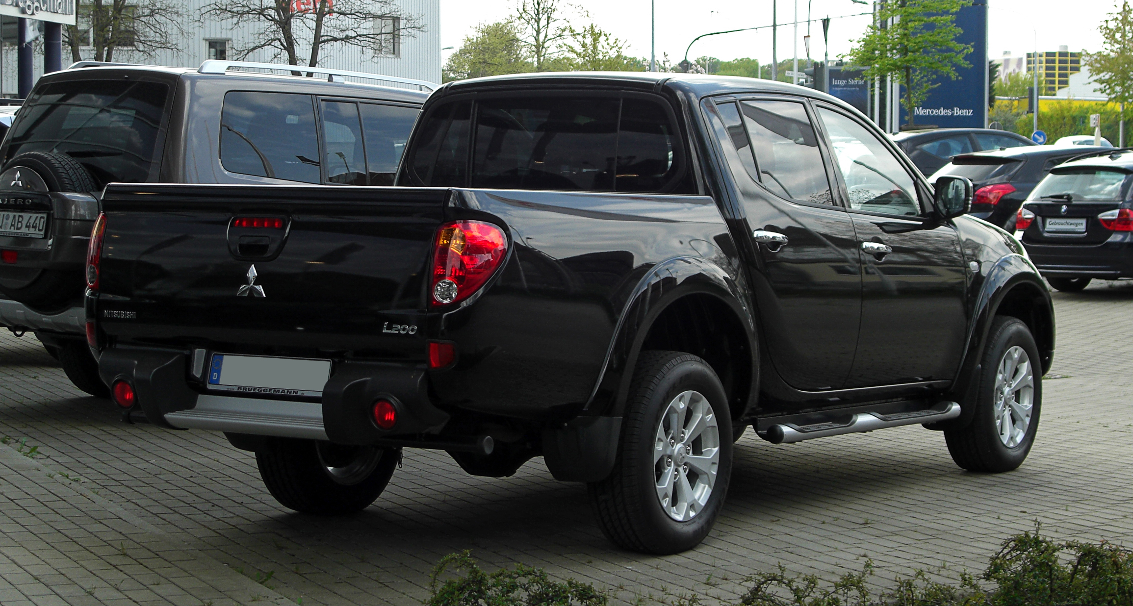 Mitsubishi L200 2500 DI-D+ Intense Doppelkabine (IV, Facelift)